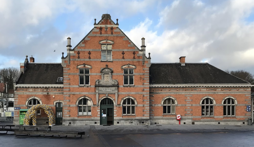 Station ferroviaire